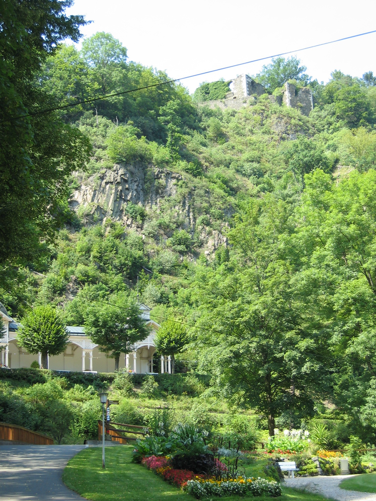 Kurpark Bad Berneck mit Kolonnaden und der Ruine Hohenberneck